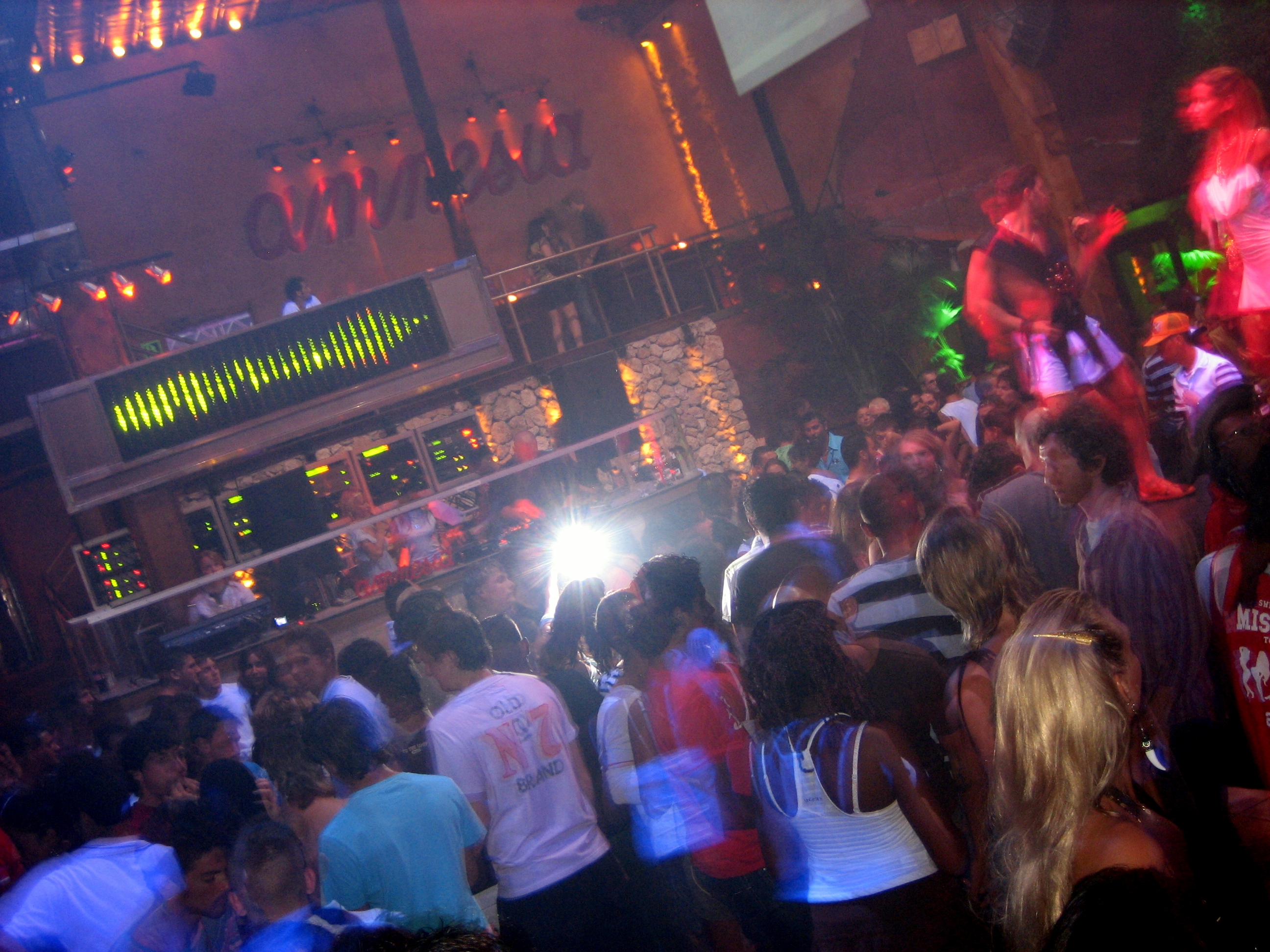 West End, Sant Antoni de Portmany (Ibiza)